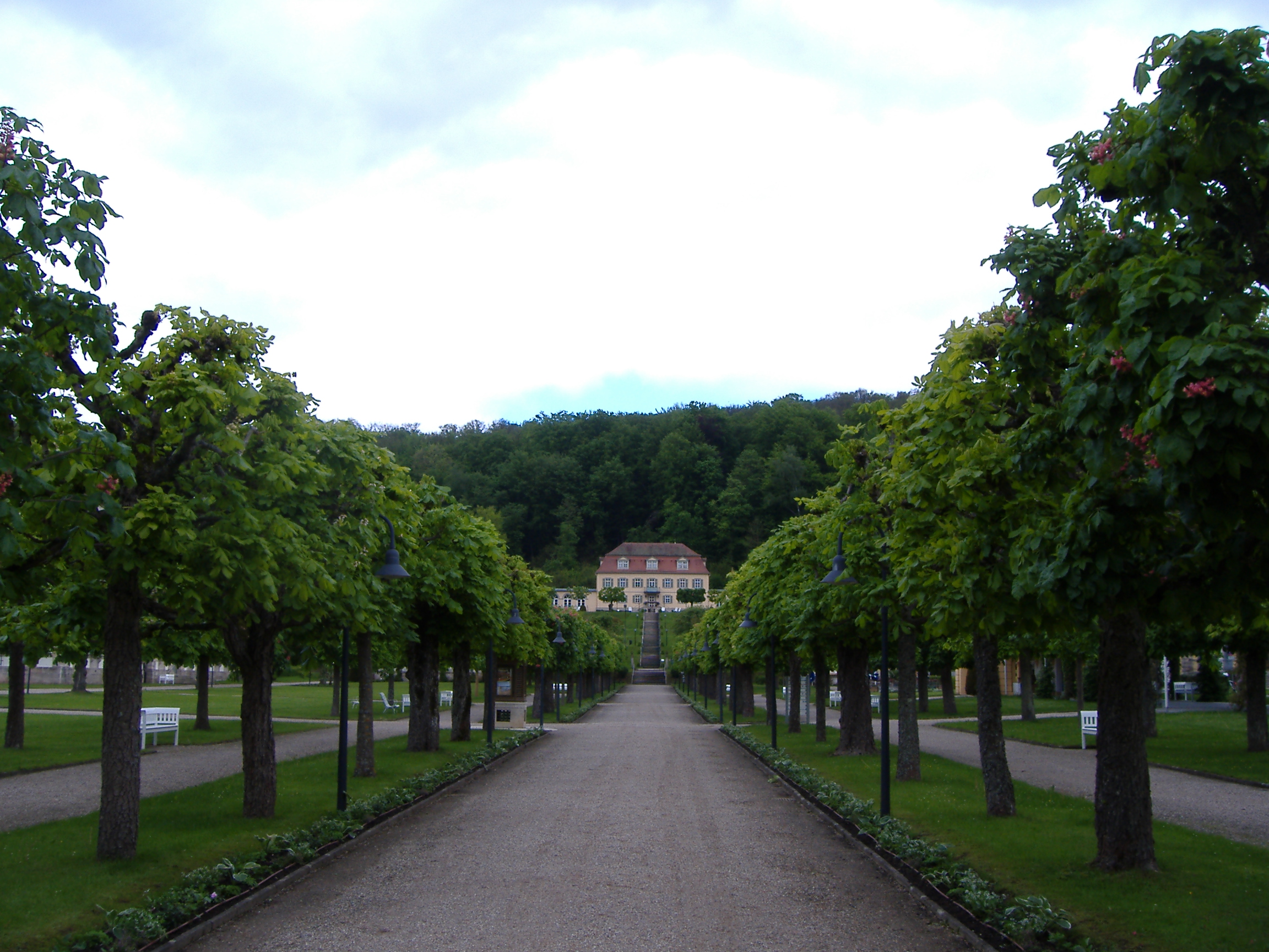 Kurpark Staatsbad Bad Brückenau